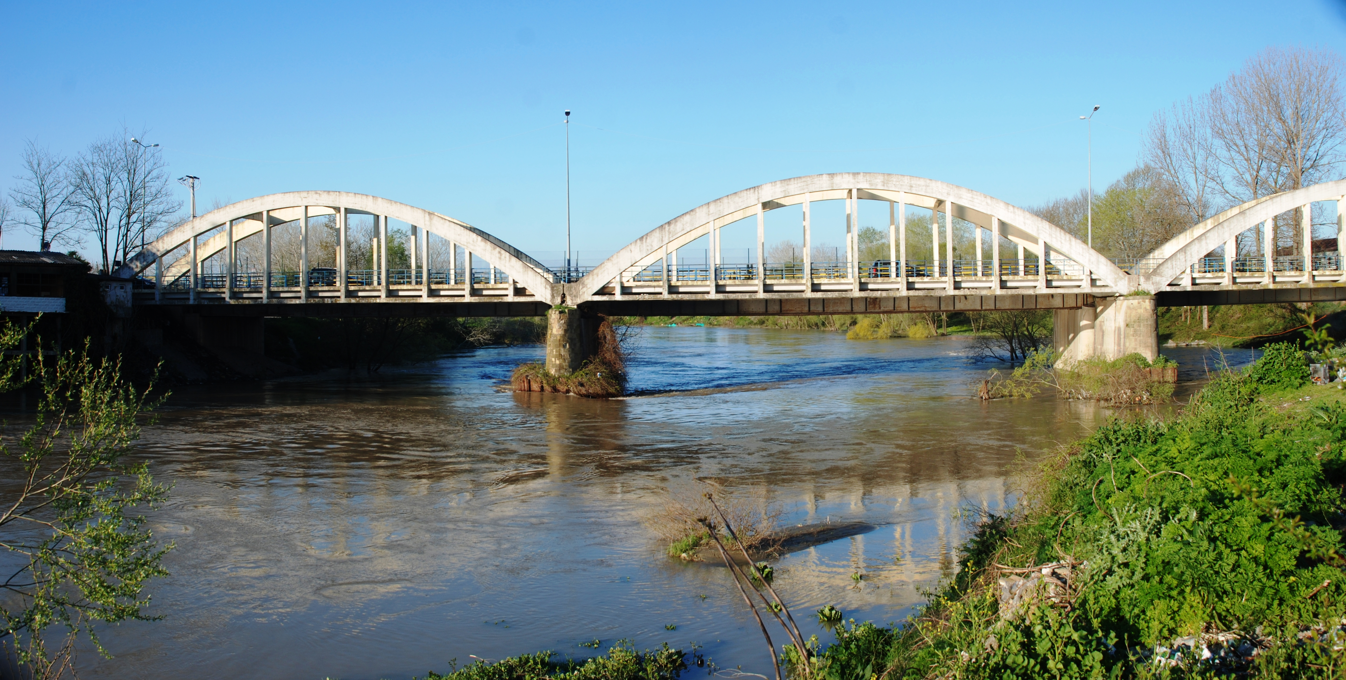 Güneşlerde Sakarya Nehri üzerindeki Eski Sakarya Köprüsü.